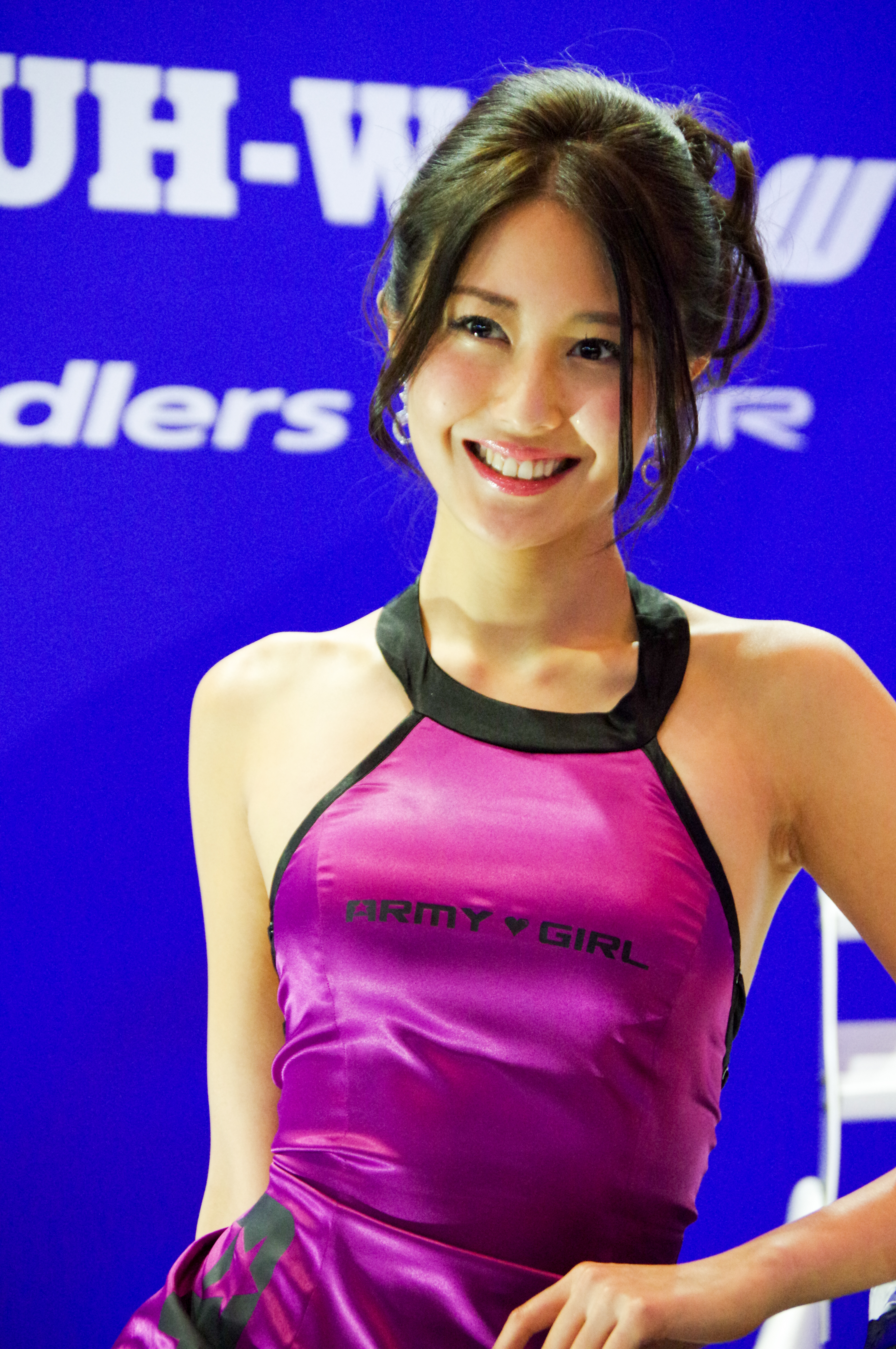 TOKYO AUTO SALON 2016 _64